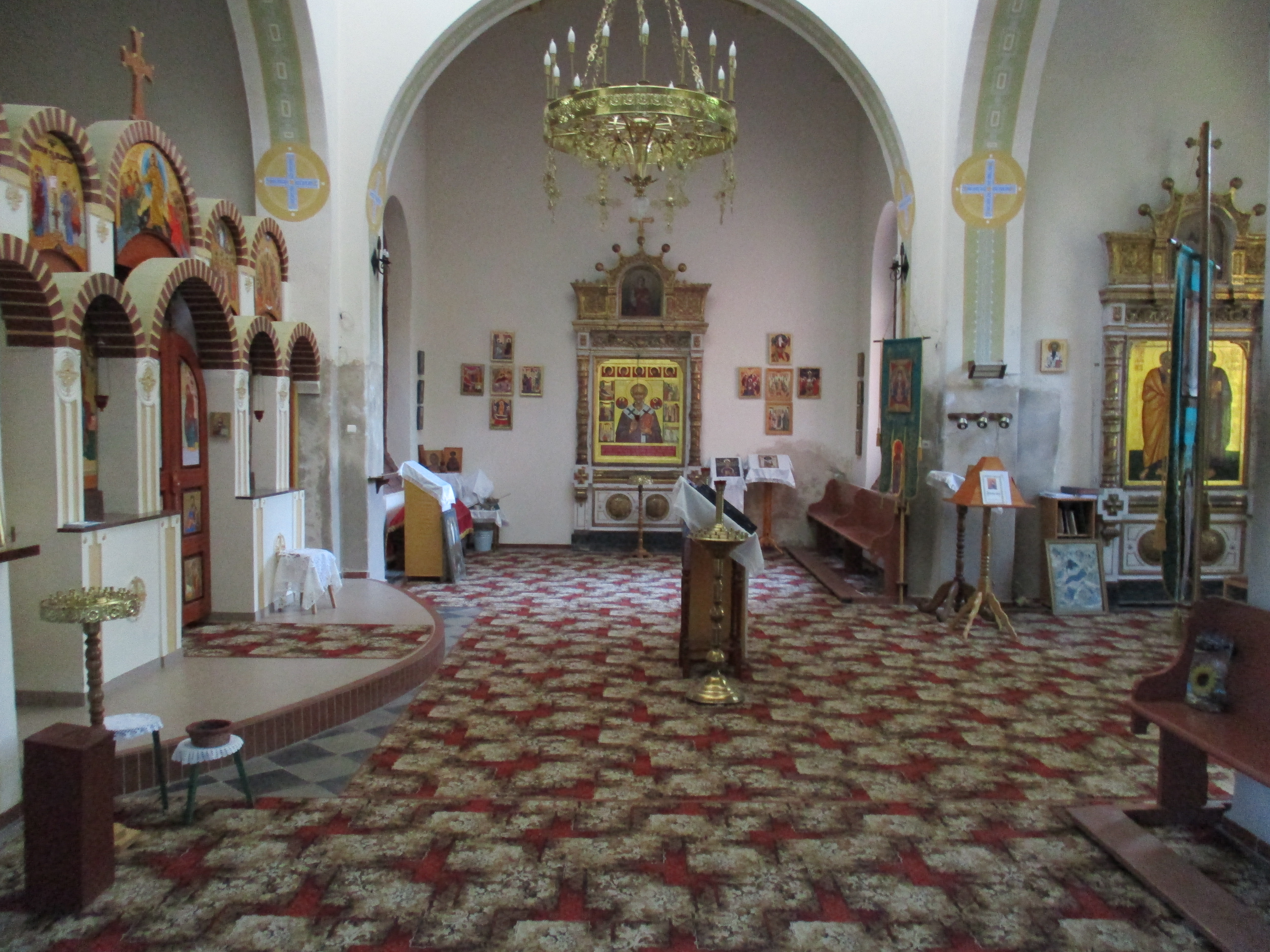 Wnętrze cerkwi św. Mikołaja Cudotwórcy w Świdnicy.